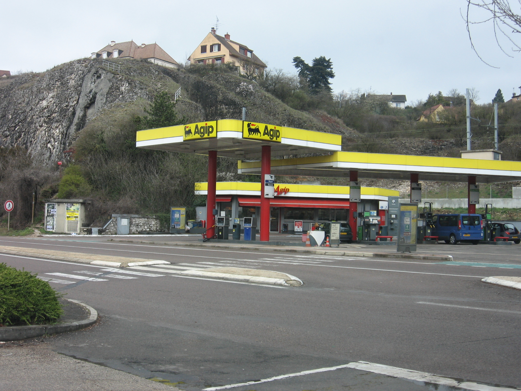 Agip, Dijon